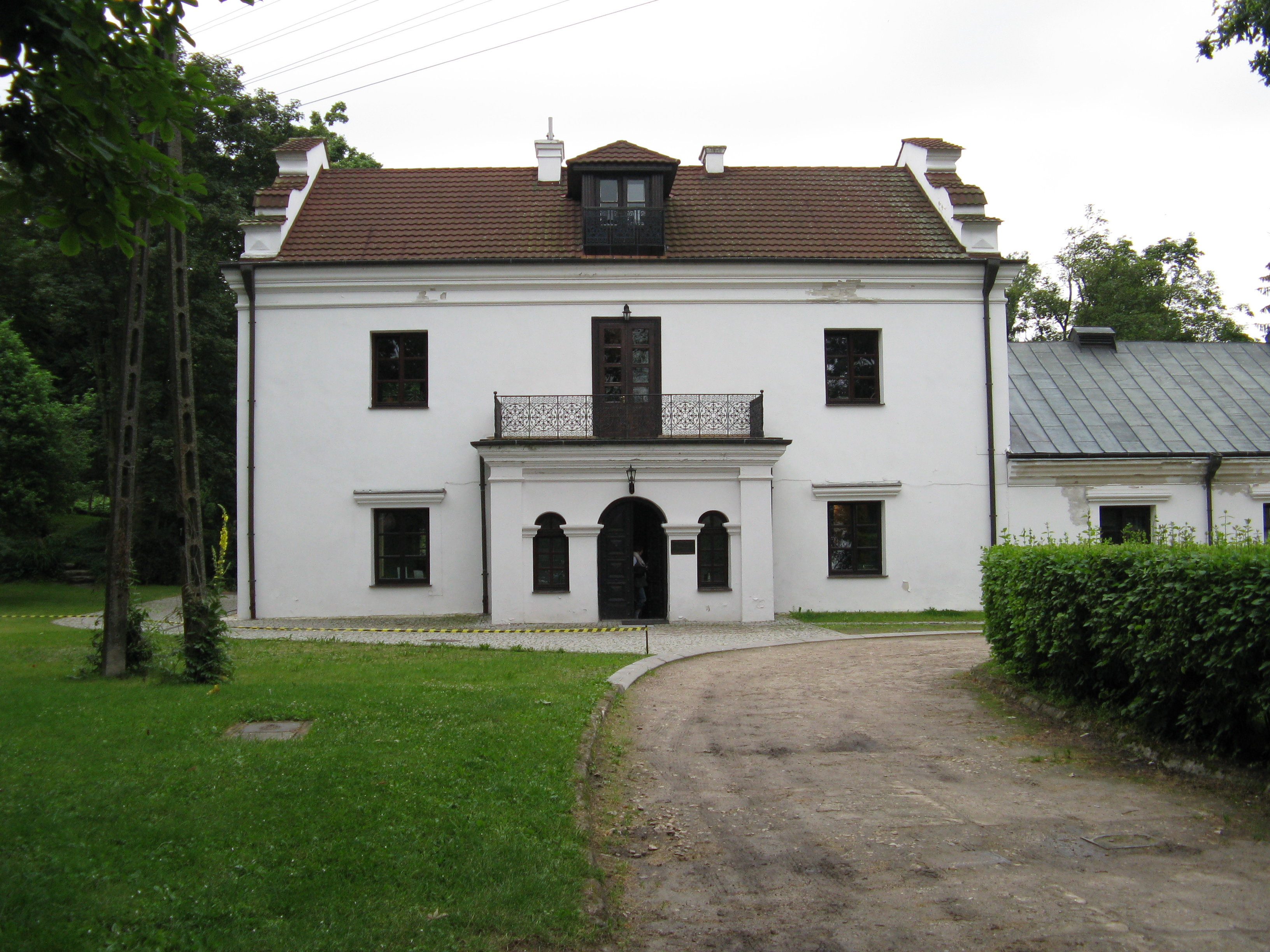 Budynek w którym odbywają się spektakle teatru